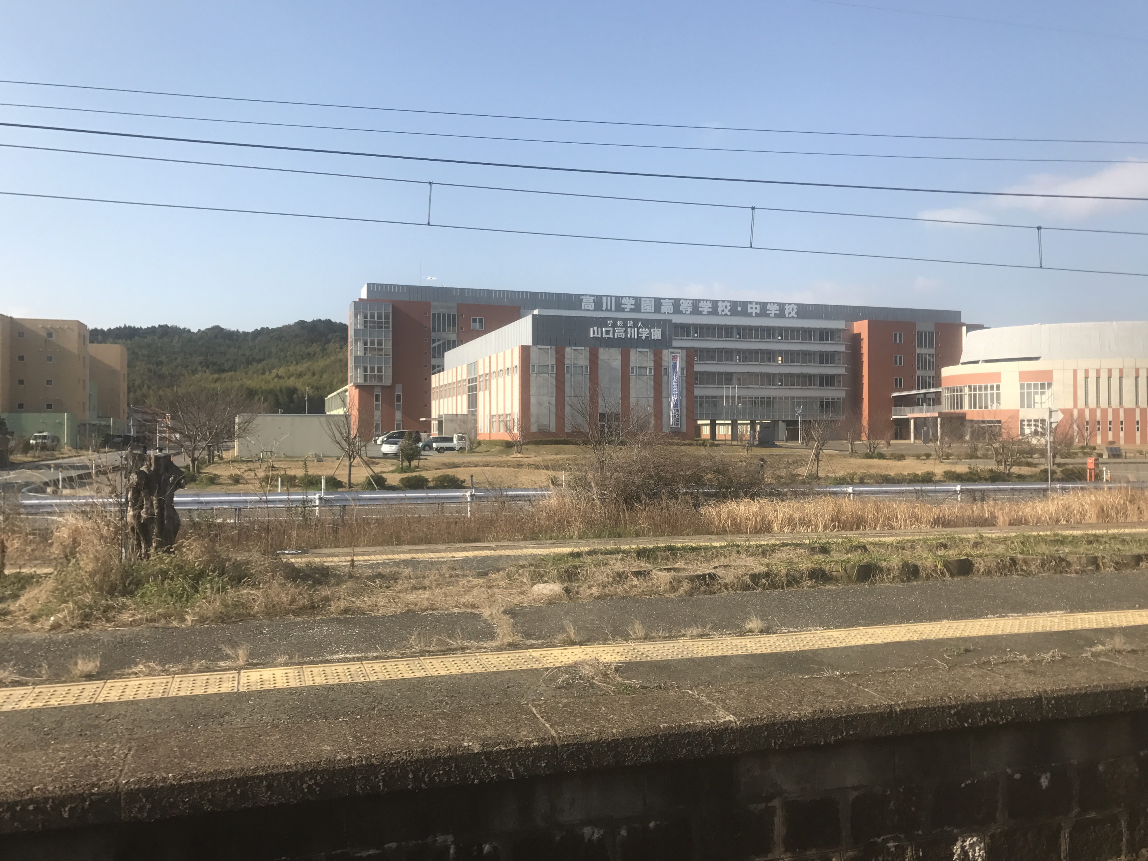 大道駅にて停車中の山陽本線列車内より望む高川学園高等学校・中学校